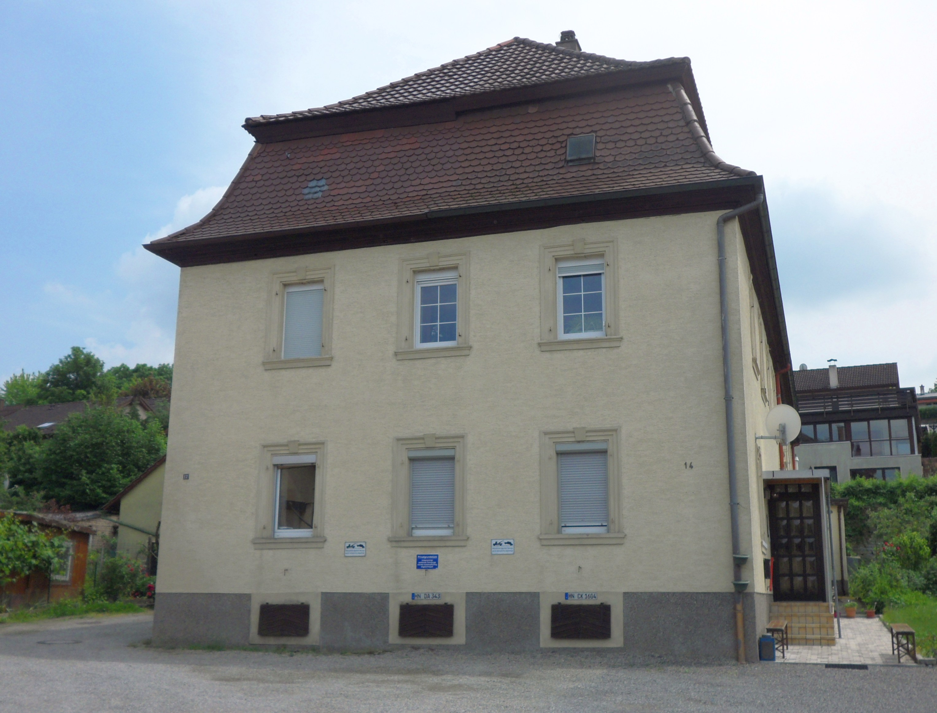 Der westliche der beiden erhaltenen Flügelbauten des Syndikus Jägerschen Baus in Bad Friedrichshall-Kochendorf, Binnetstr. 14